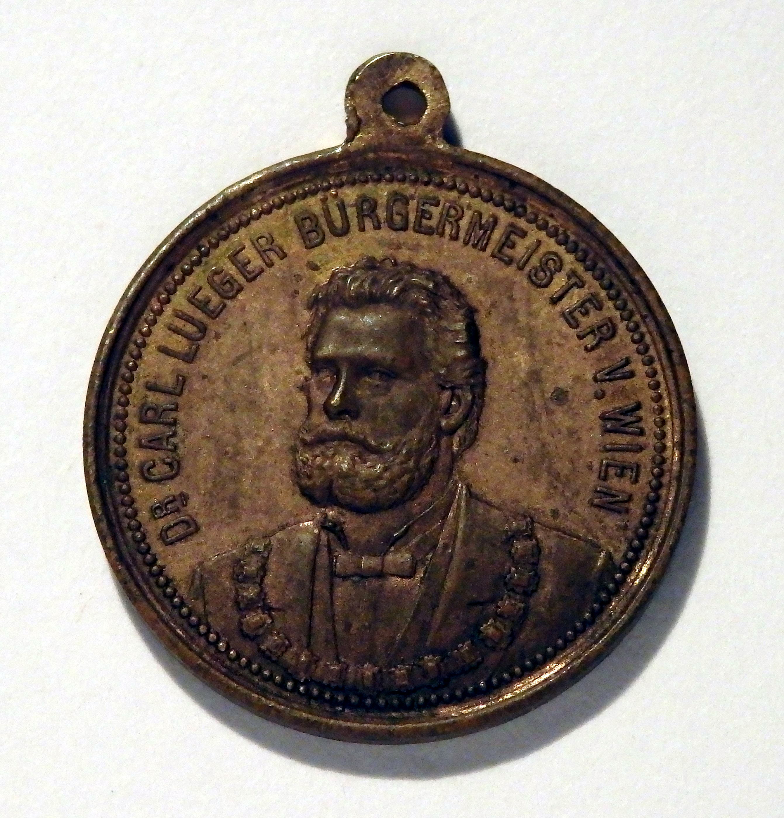 Medaille auf Bestätigung Luegers durch den Kaiser, Porträtseite